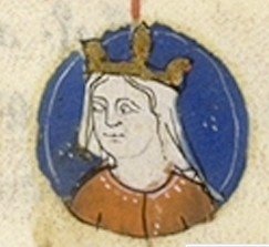 Empress Mathilda